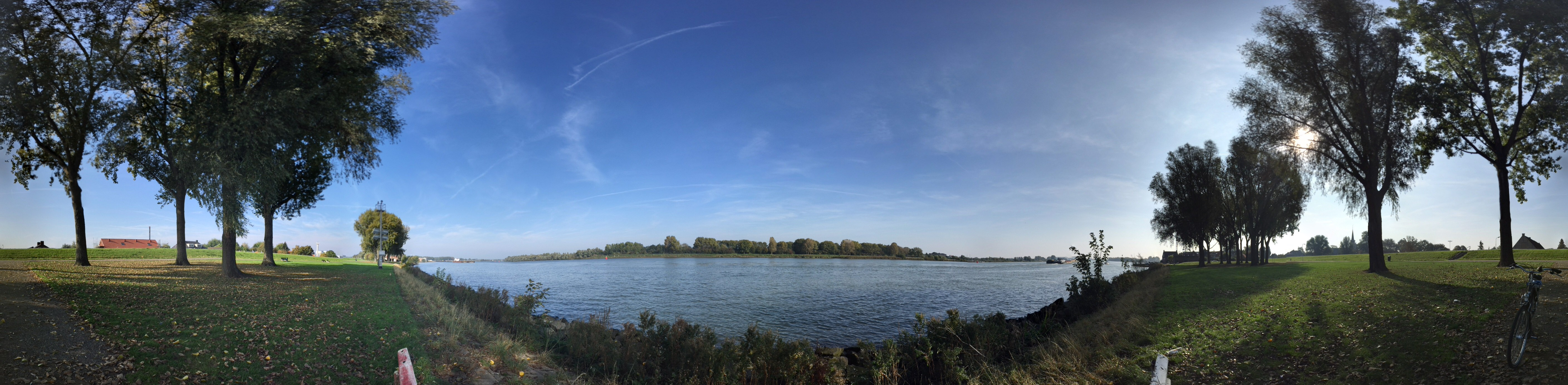 Een panorama van de Oude Maas ter hoogte van Puttershoek